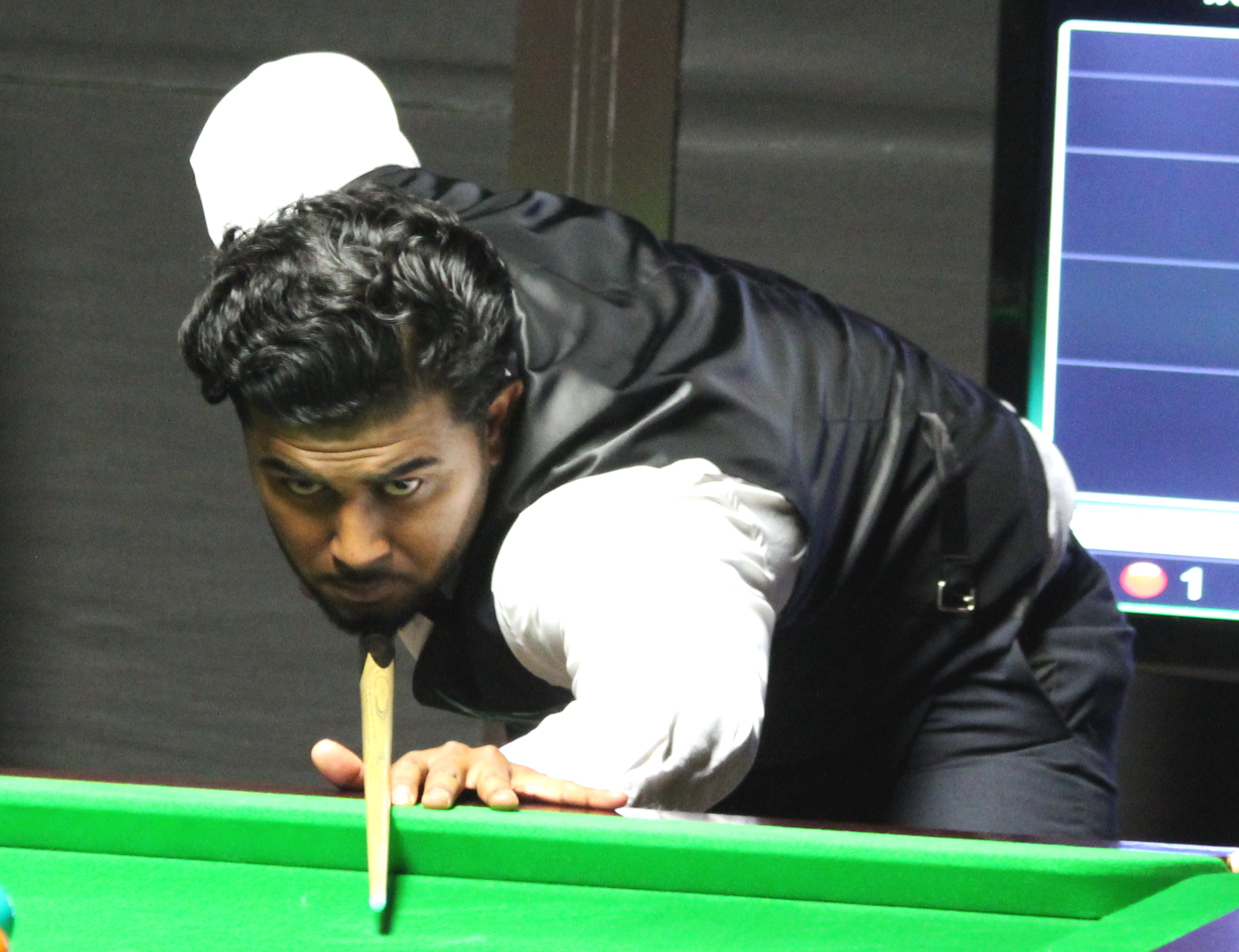 Hammad Miah beim Paul Hunter Classic 2016